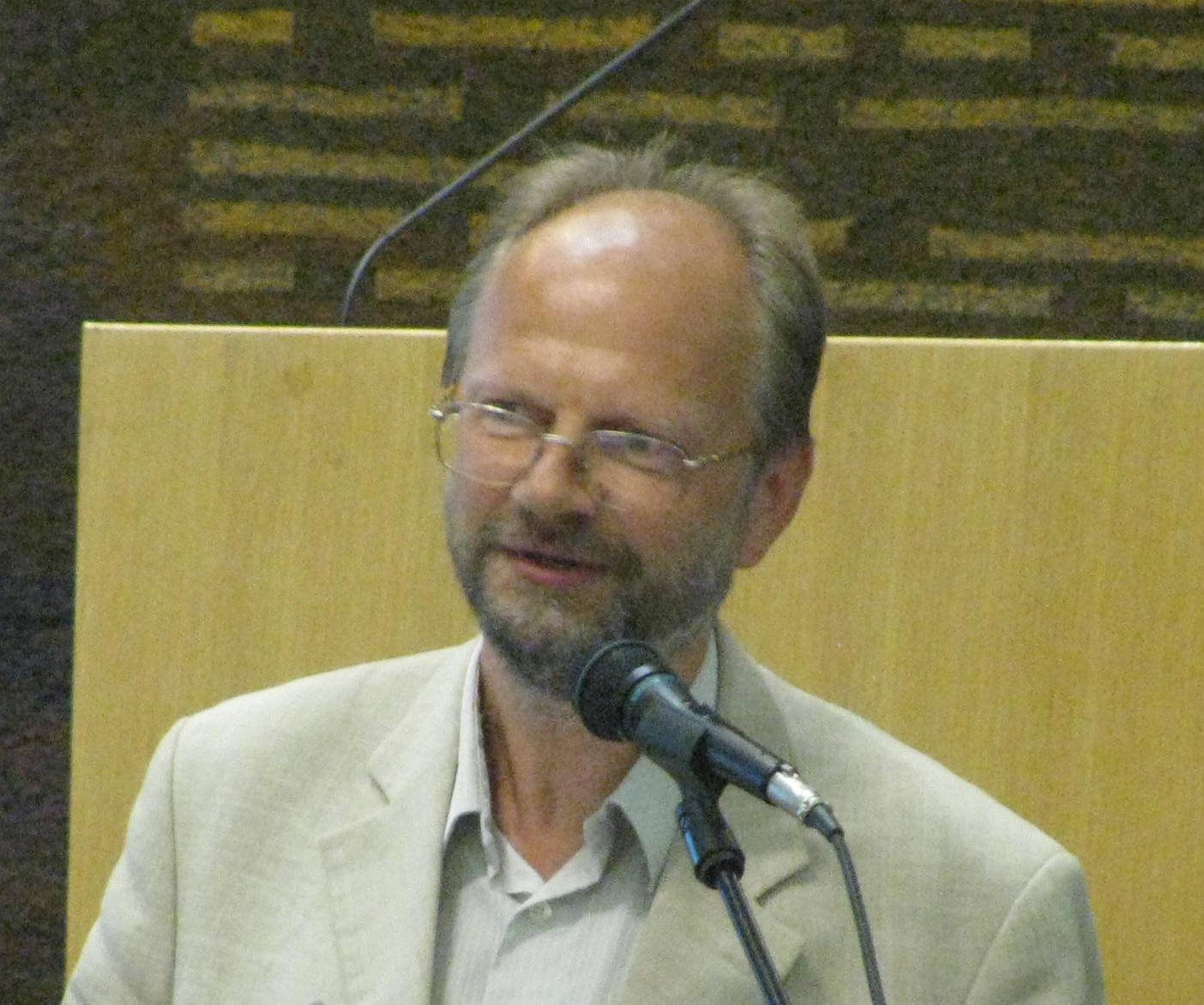 Peeter Müürsepp juunior esinemas Eesti filosoofia 7. aastakonverentsil Tartus